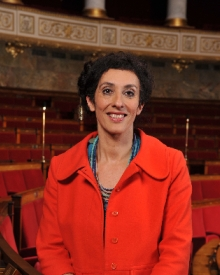 Photo de Chaynesse Khirouni, députée de la première circonscription de Meurthe-et-Moselle, prise à l'Assemblée nationale en 2012